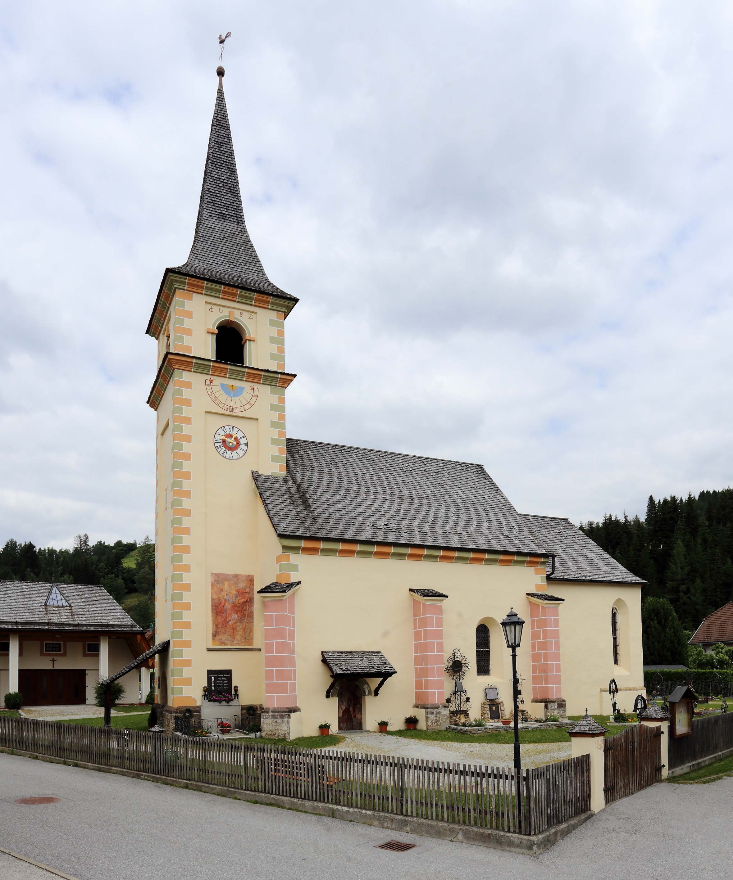 Katholische Filialkirche hl. Andreas in der Salzburger Gemeinde Sankt Andrä im Lungau.